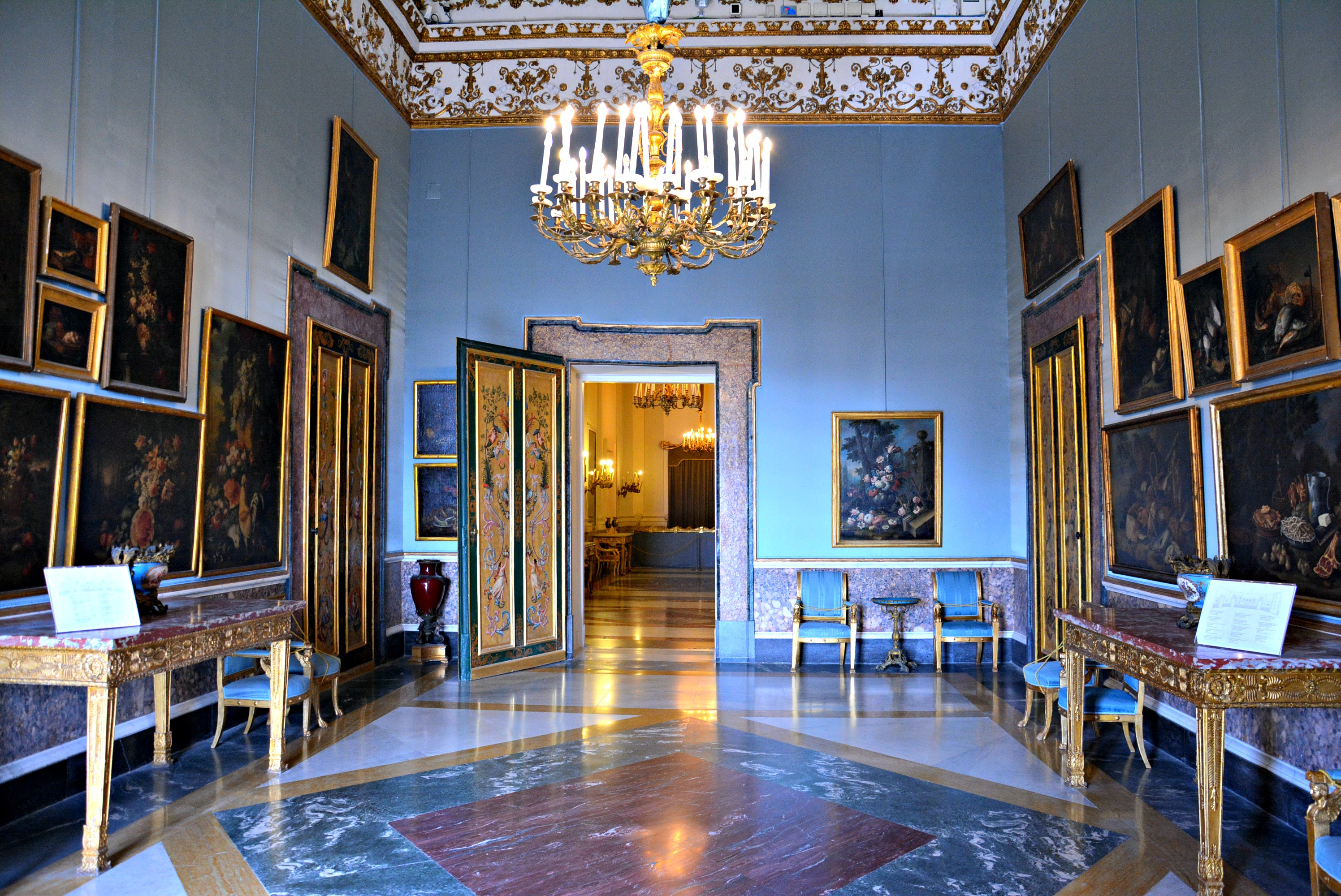 Vedi titolo